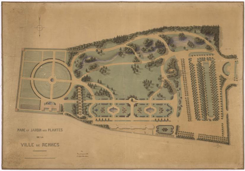 Jardin des Plantes de la Ville de Rennes, Rennes. Plan de Denis Bühler. Format réel 150 x 109cm.